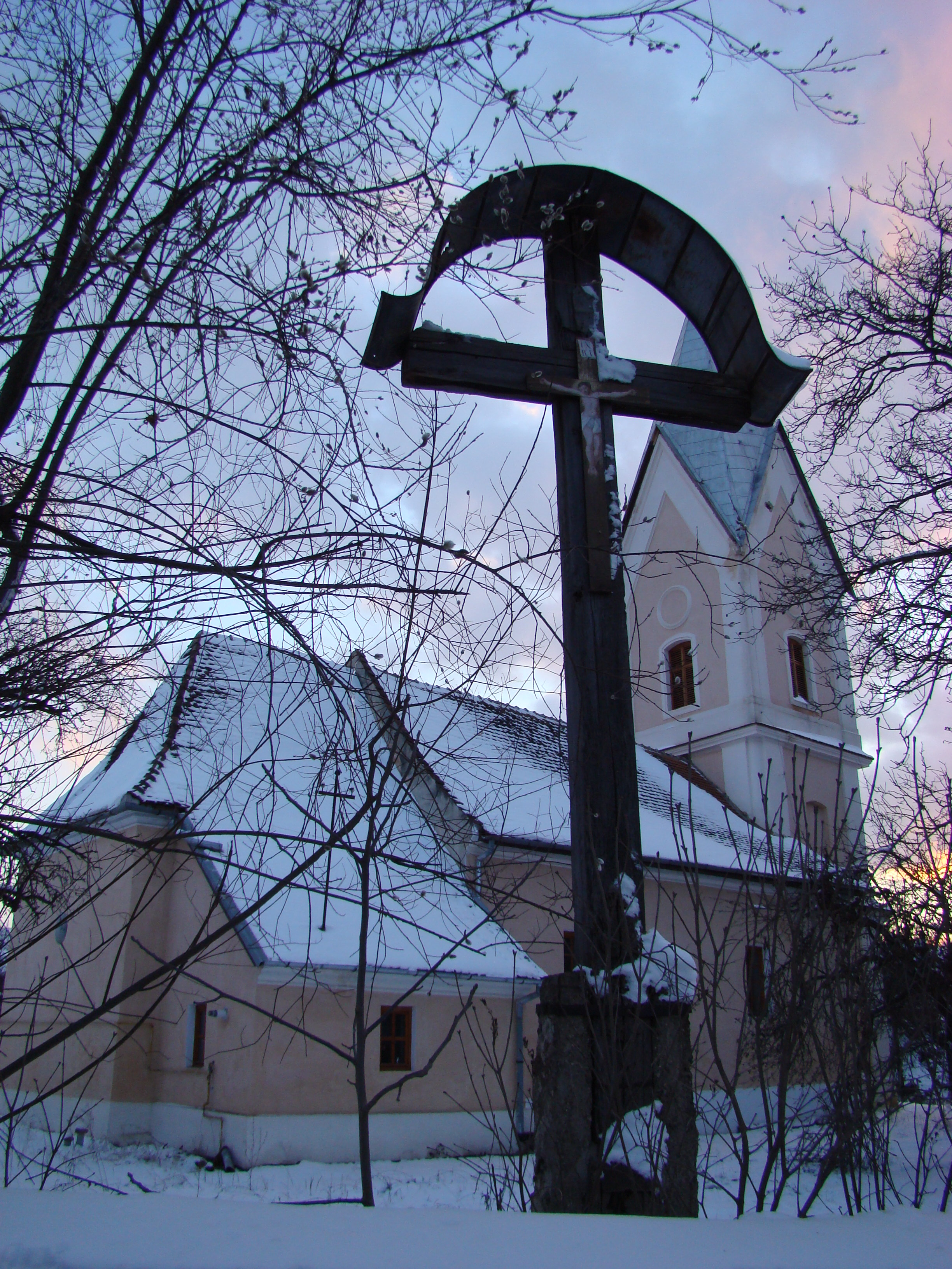 Biserica romano-catolică din Vlaha, juidețul Cluj